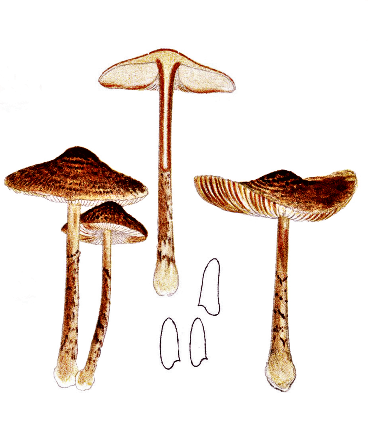 Lepiota castanea Quél. (1881)